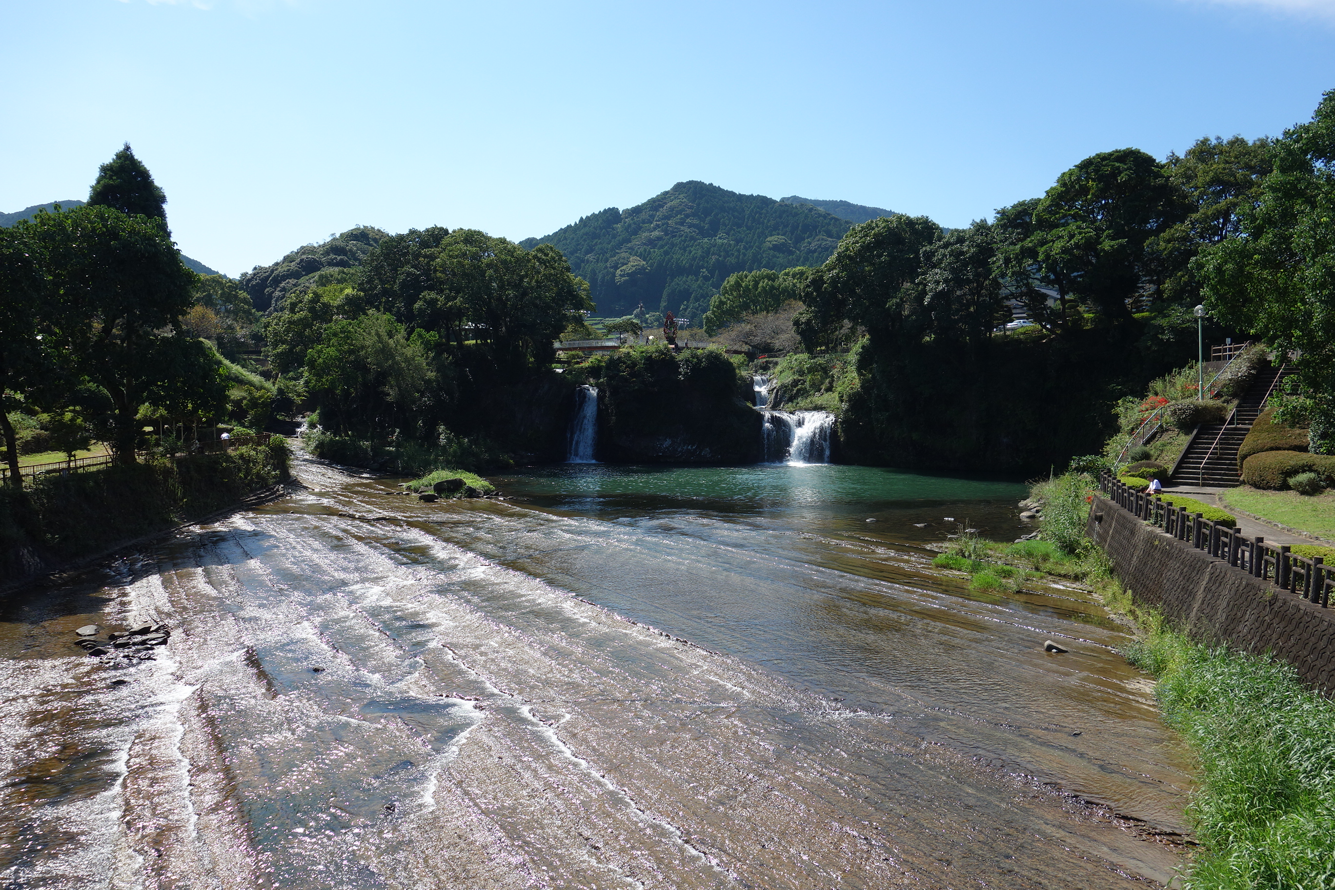 轟の滝公園 20150920